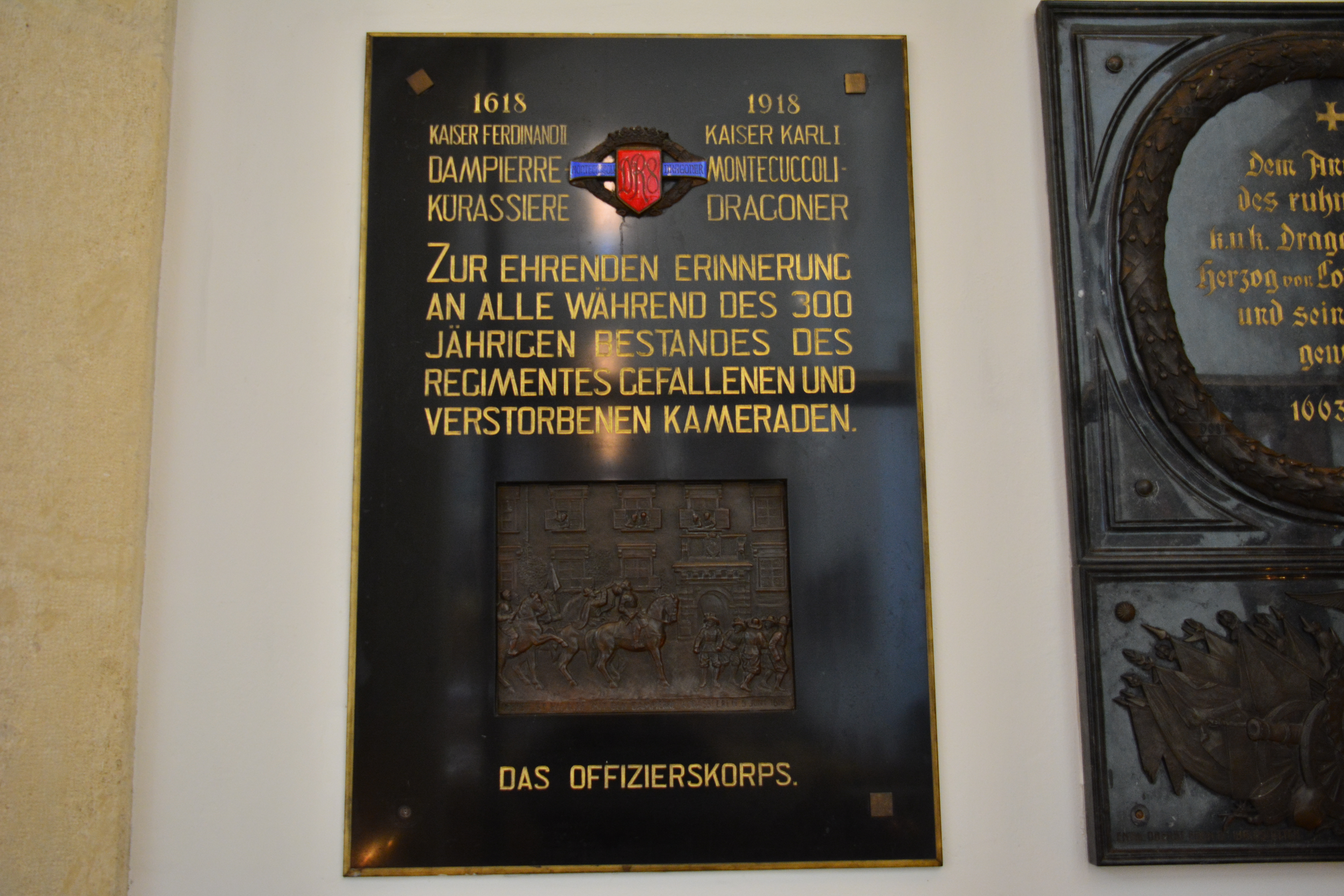 Gedenktafel für das k.u.k. Dragonerregiment Nr. 8 (Wien, Neuer Markt, Kapuzinerkirche)